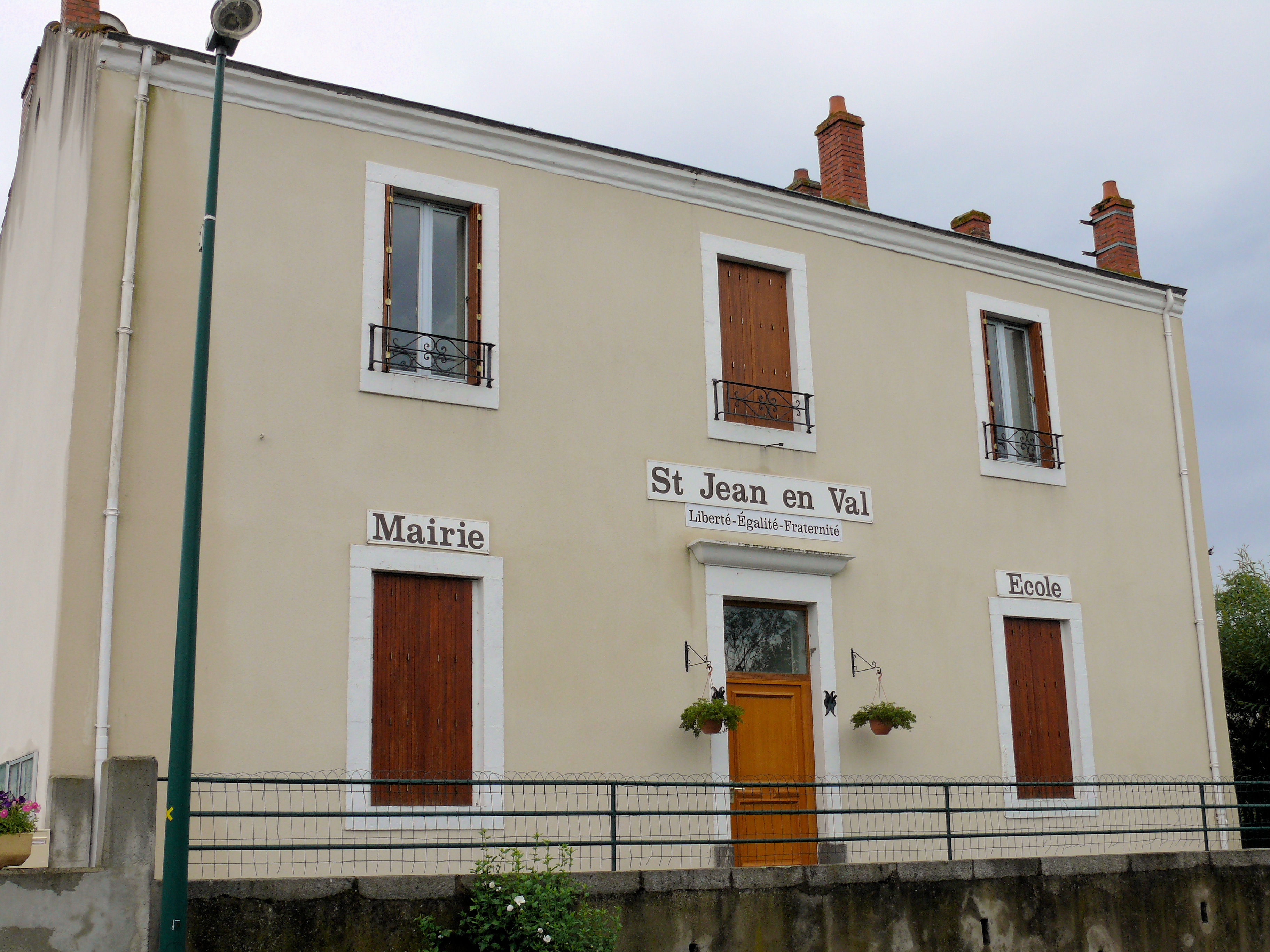 Saint-Jean-en-Val - Mairie école